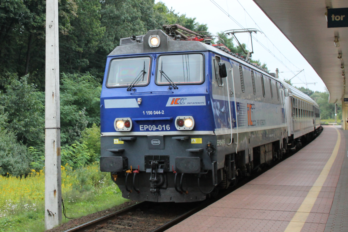 Elektrowóz EP09-016 stoi na stacji Puławy Miasto. This photo was taken during Railway Wikiexpedition 2014 set up by Wikimedia Polska Association in cooperation with Fundacja Grupy PKP.You can see all photographs in category Wikiekspedycja kolejowa 2014.